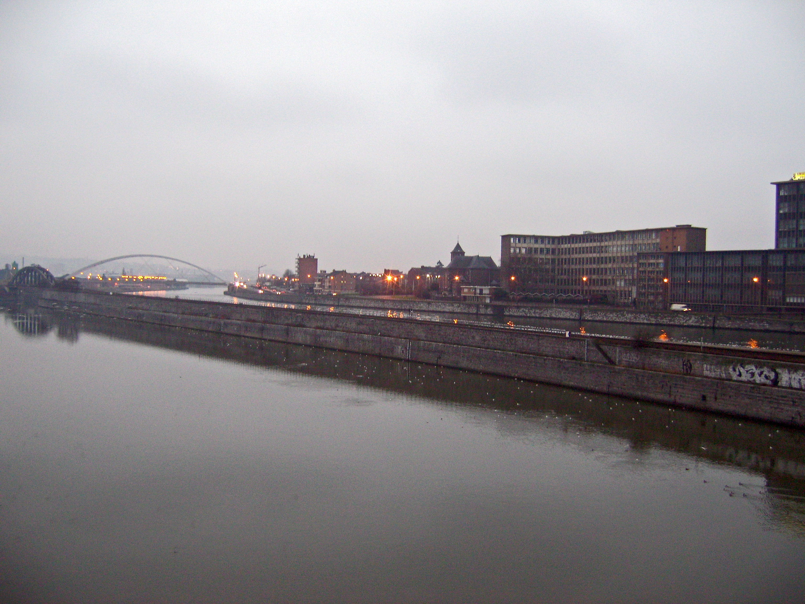 Herstal